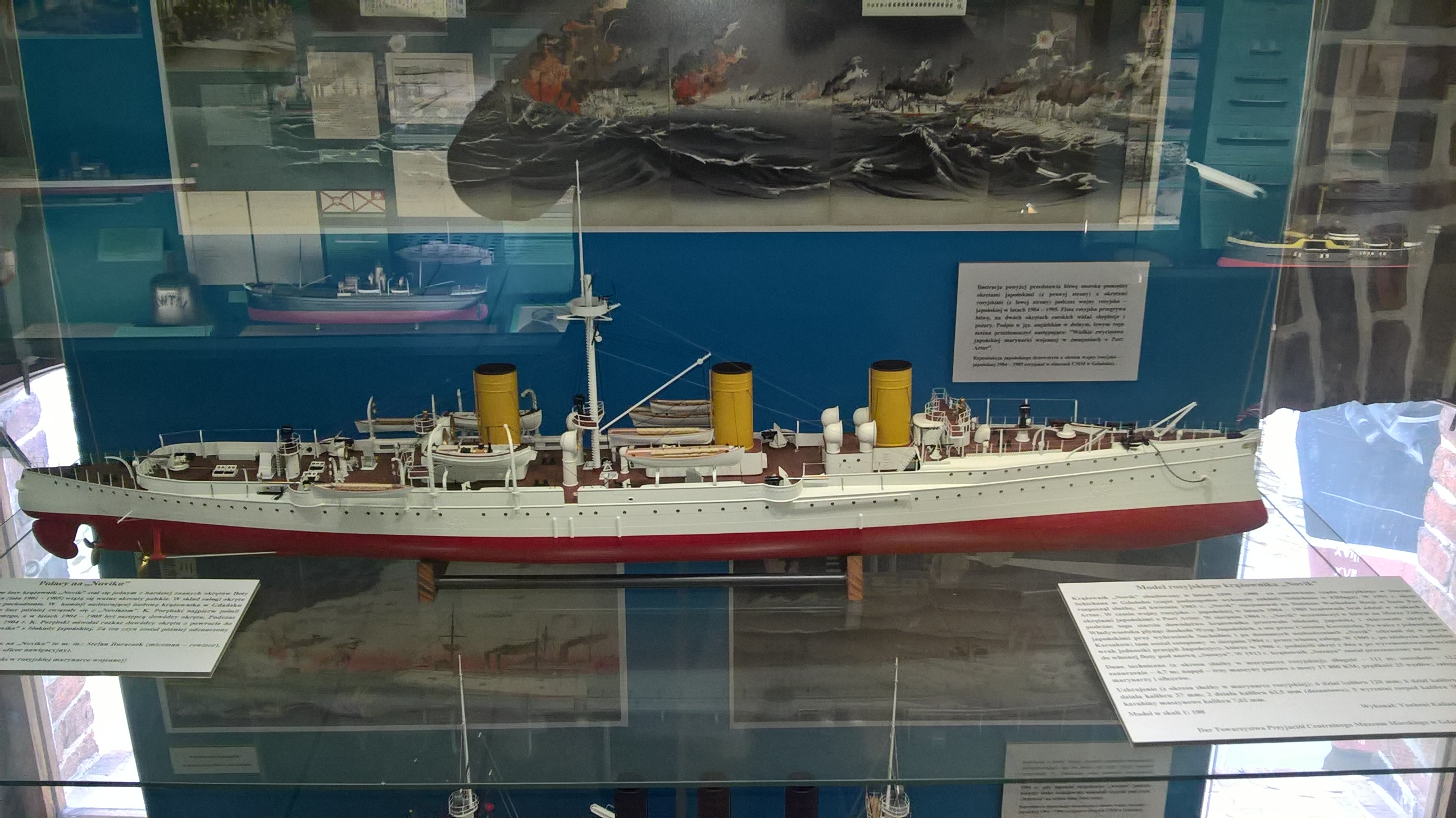 Model rosyjskiego krążownika "Nowik", eksponowany w Narodowym Muzeum Morskim w Gdańsku.